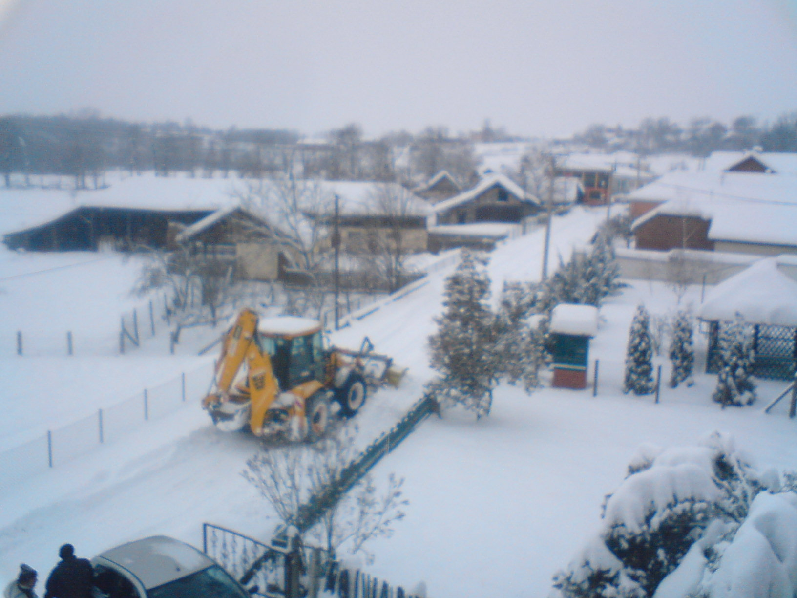 Čisćenje ulica prekrivenih snegom u Batočini. Slikano 11. februara 2012